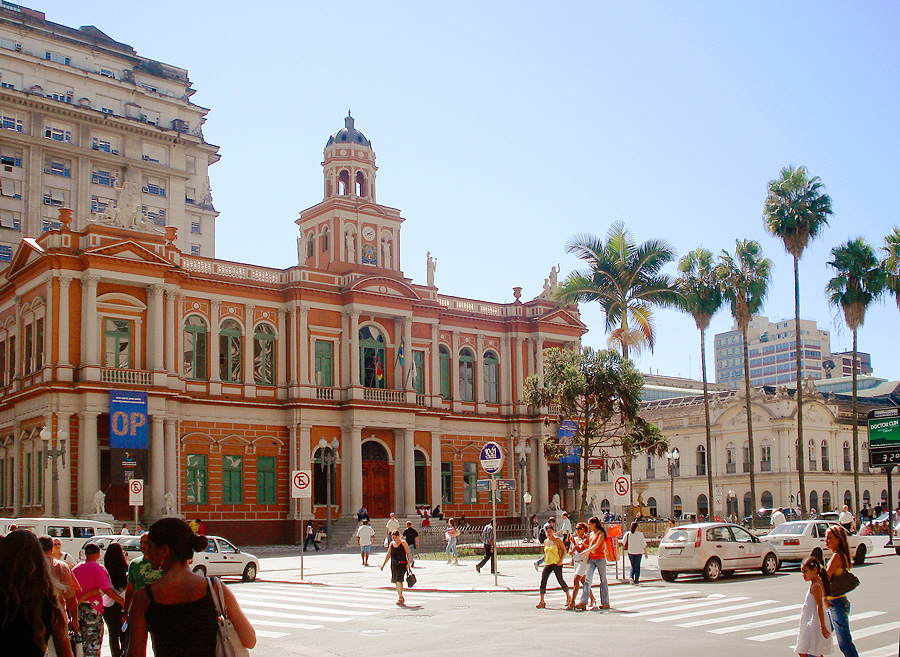 Praça Montevidéu e Paço Municipal, Porto ALegre, Brasil.